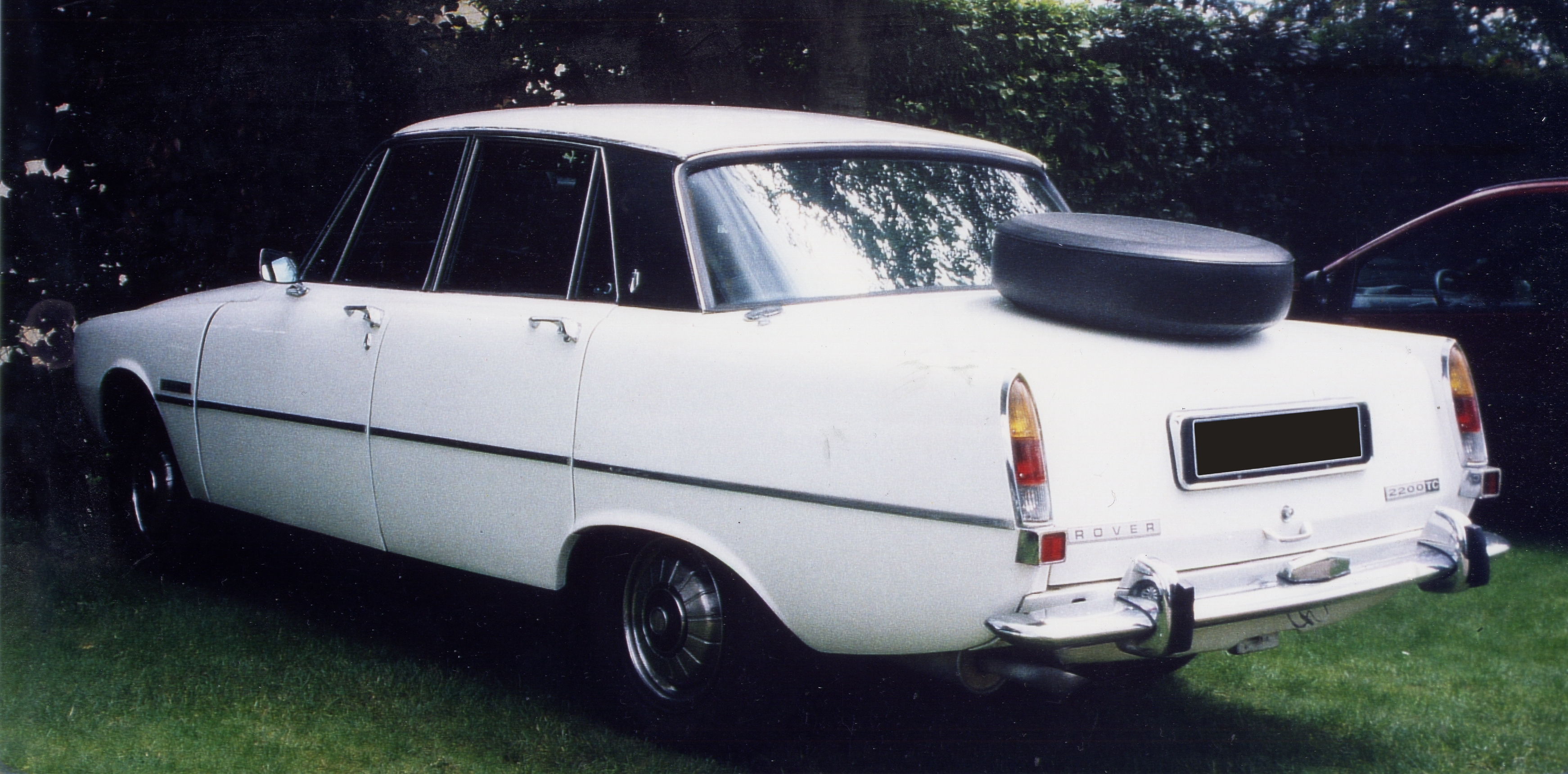 Rover 2200 in Giverny